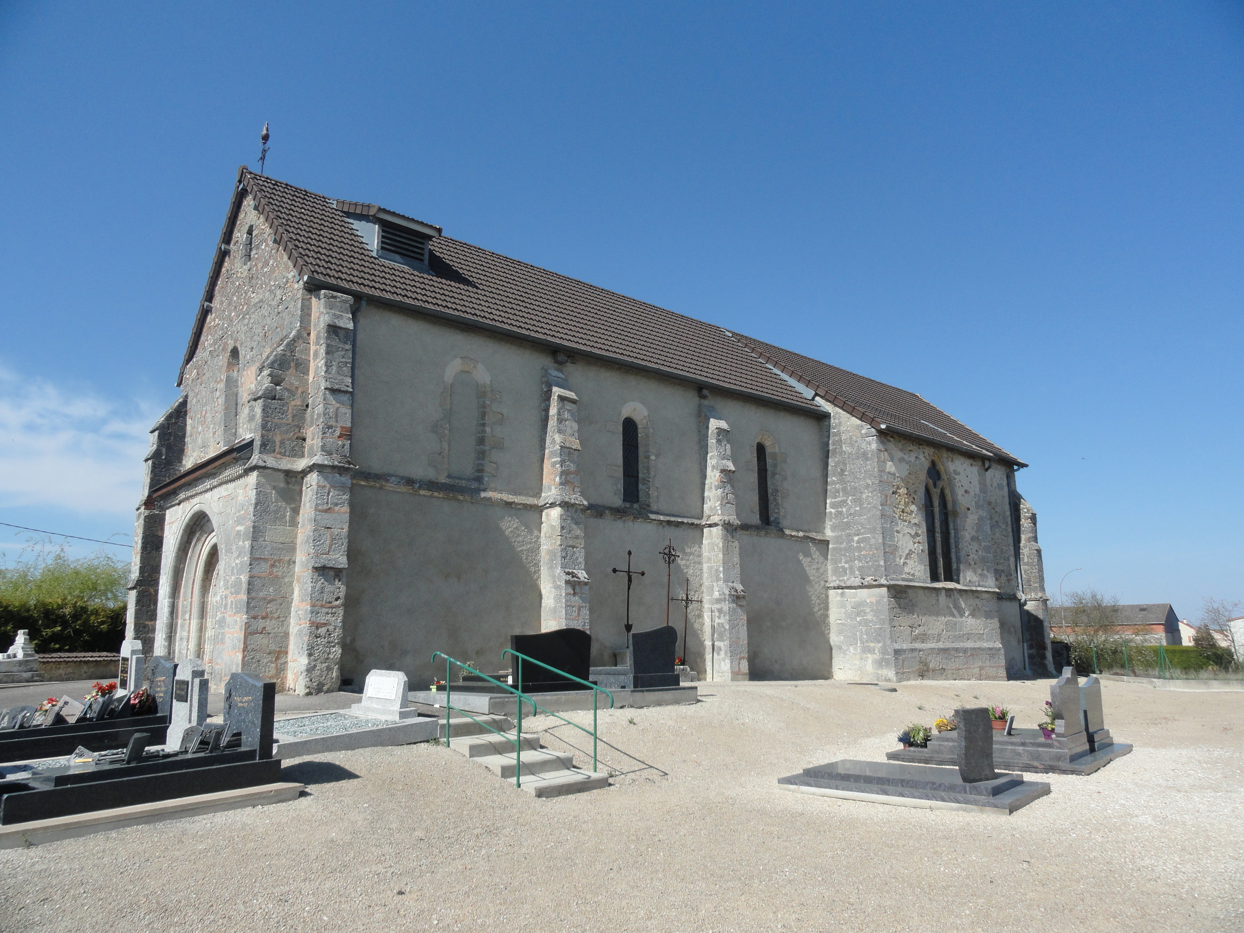 Côté et partie du cimetière de l'église Saint-Médard de Saint-Mard-lès-Rouffy (France).